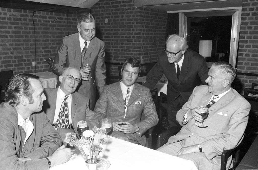 Der aus der DDR geflüchtete Arzt (Mitte) wird von in Kiel lebenden Landsleuten begrüßt. V.l. der Chirurg Dr. C. P. Finck aus Rostock, der Landesvorsitzende der mecklenburgischen Landsmannschaft, Alfred Jäger, der Kieler Ortsvorsitzende K. H. Albrecht, Regierungsdirektor Dr. Wahlsdorff von der Landesregierung, die Patenland für Mecklenburg ist, und Gerhard Wandschneider, Präsident des schleswig-holsteinischen Sparkassen- und Giroverbandes und Mitglied des Bundesvorstandes der mecklenburgischen Landsmannschaft.